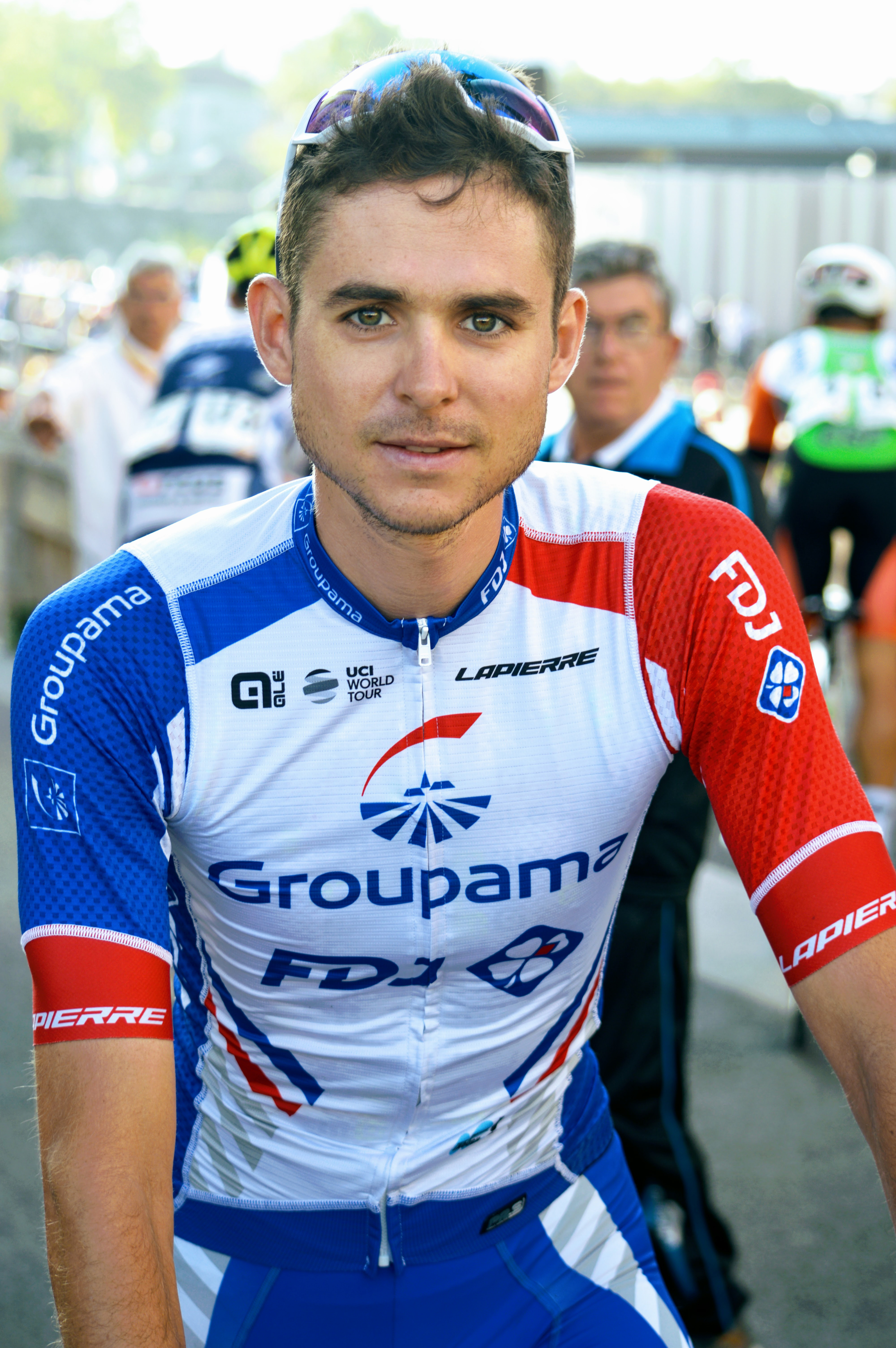 Rudy MOLARD - Août 2017